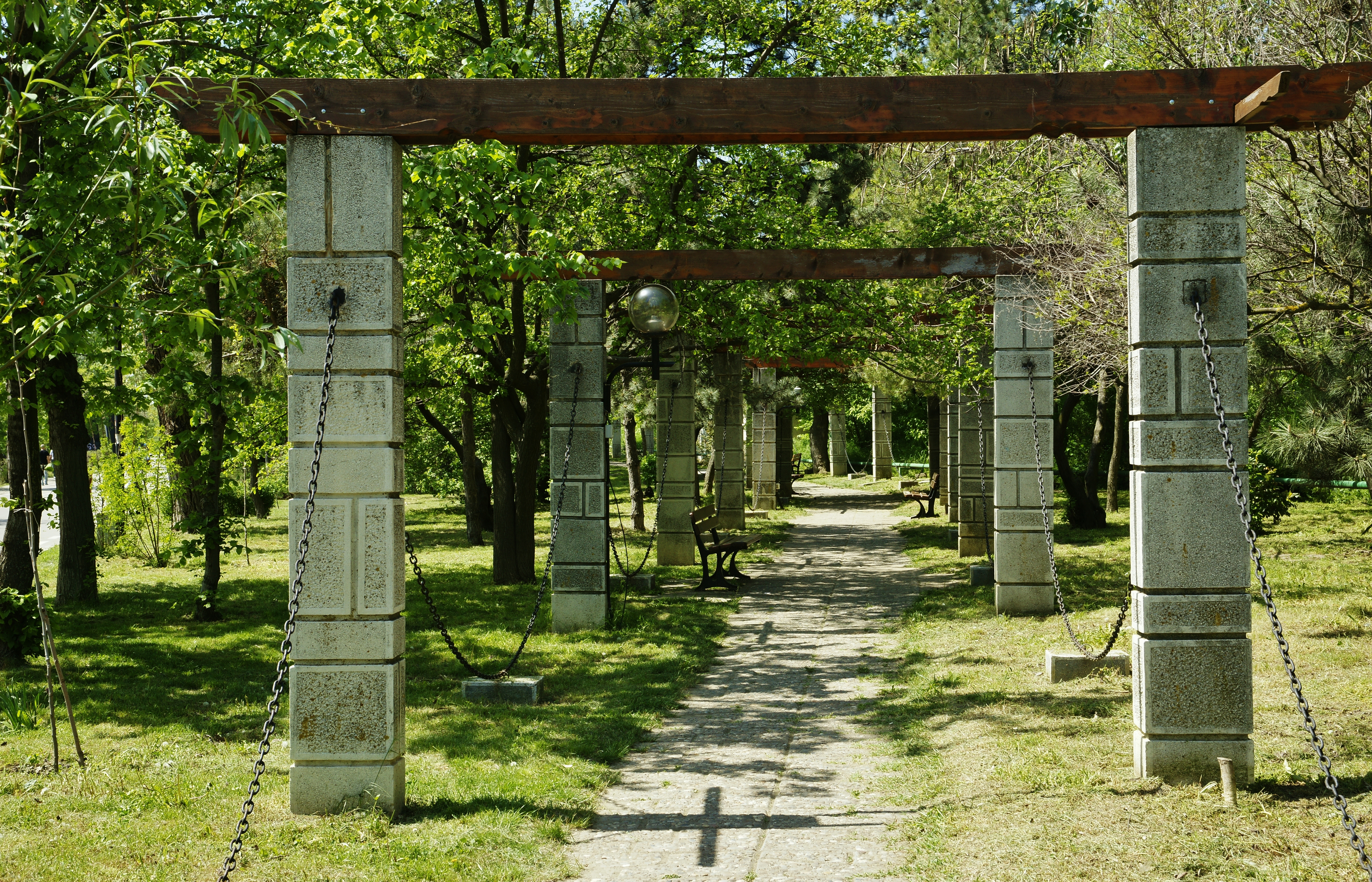 "Tunelul timpului" ... sau puntea einstein-rosen-podolsky